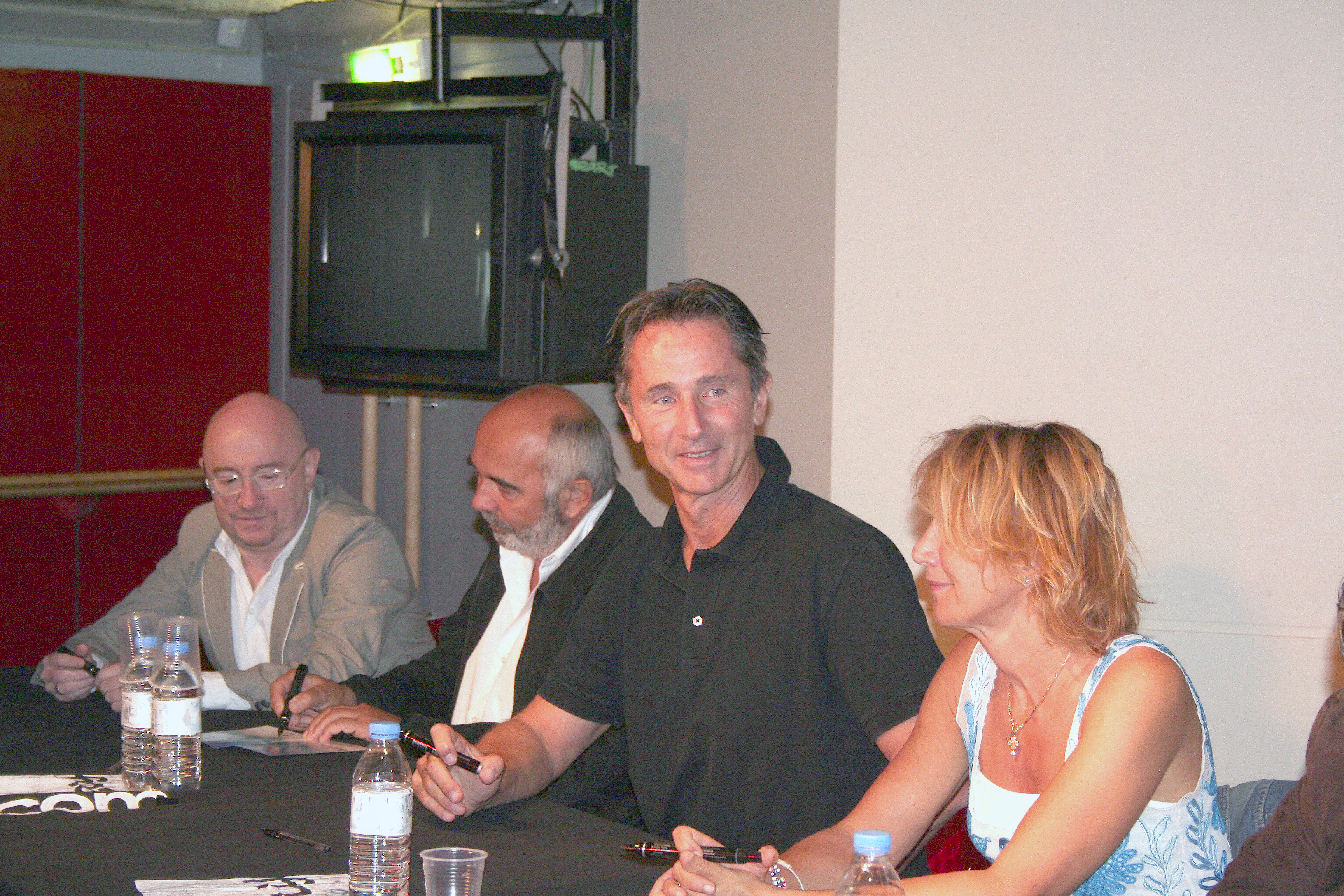 Séance de dédicaces avec l'équipe des Bronzés organisée par la Fnac des Halles (Paris, France).